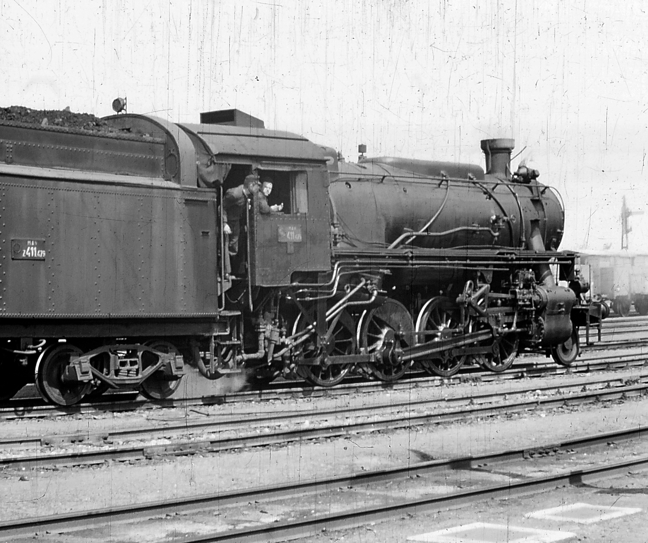 411-es gőzmozdony (Truman mozdony). Tags: steam locomotive, Hungarian Railways, railway, american brand, MÁV Class 411 Title: 411-es gőzmozdony (Truman mozdony).